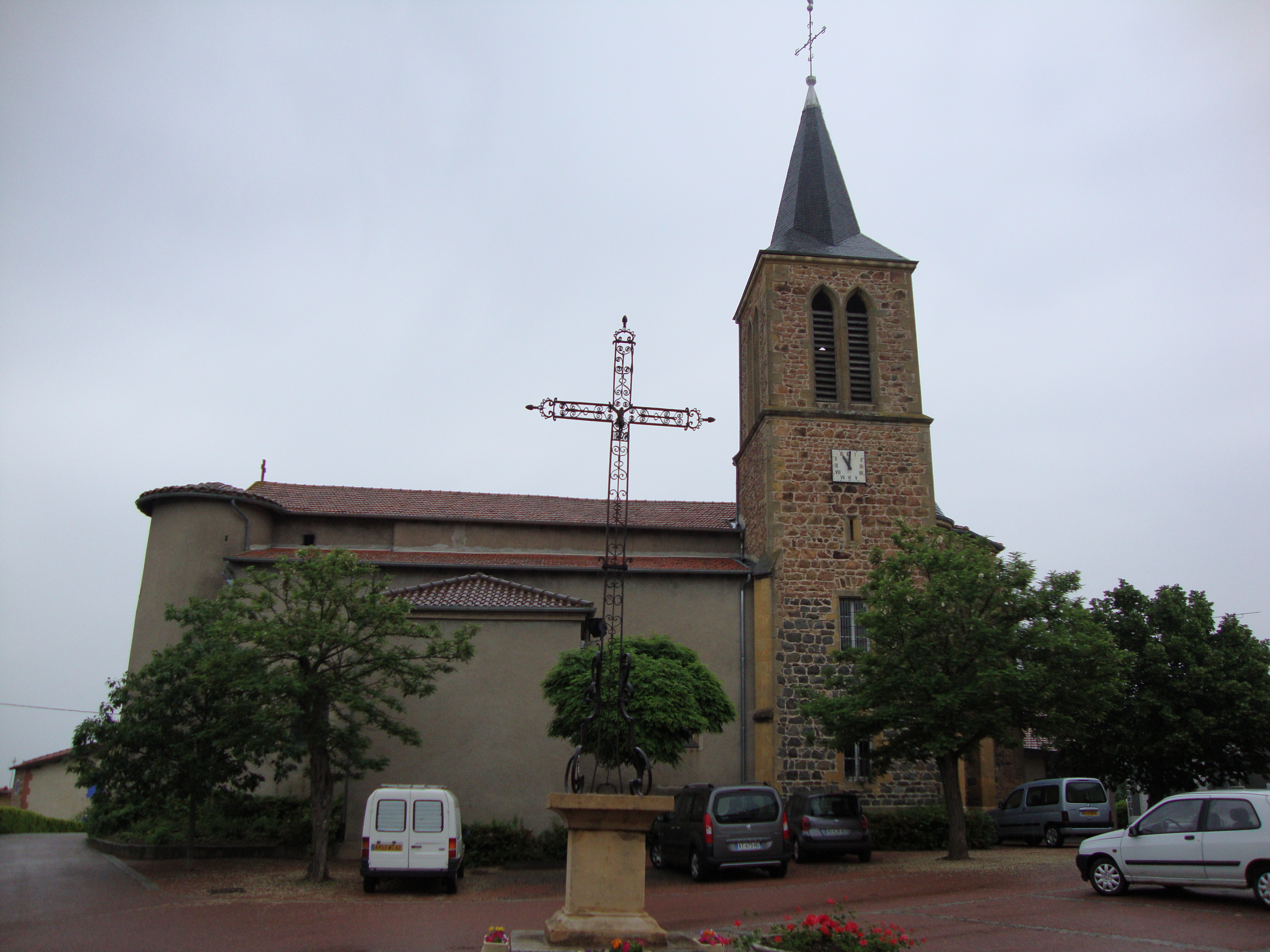 Vendranges (Loire, Fr) église, croix